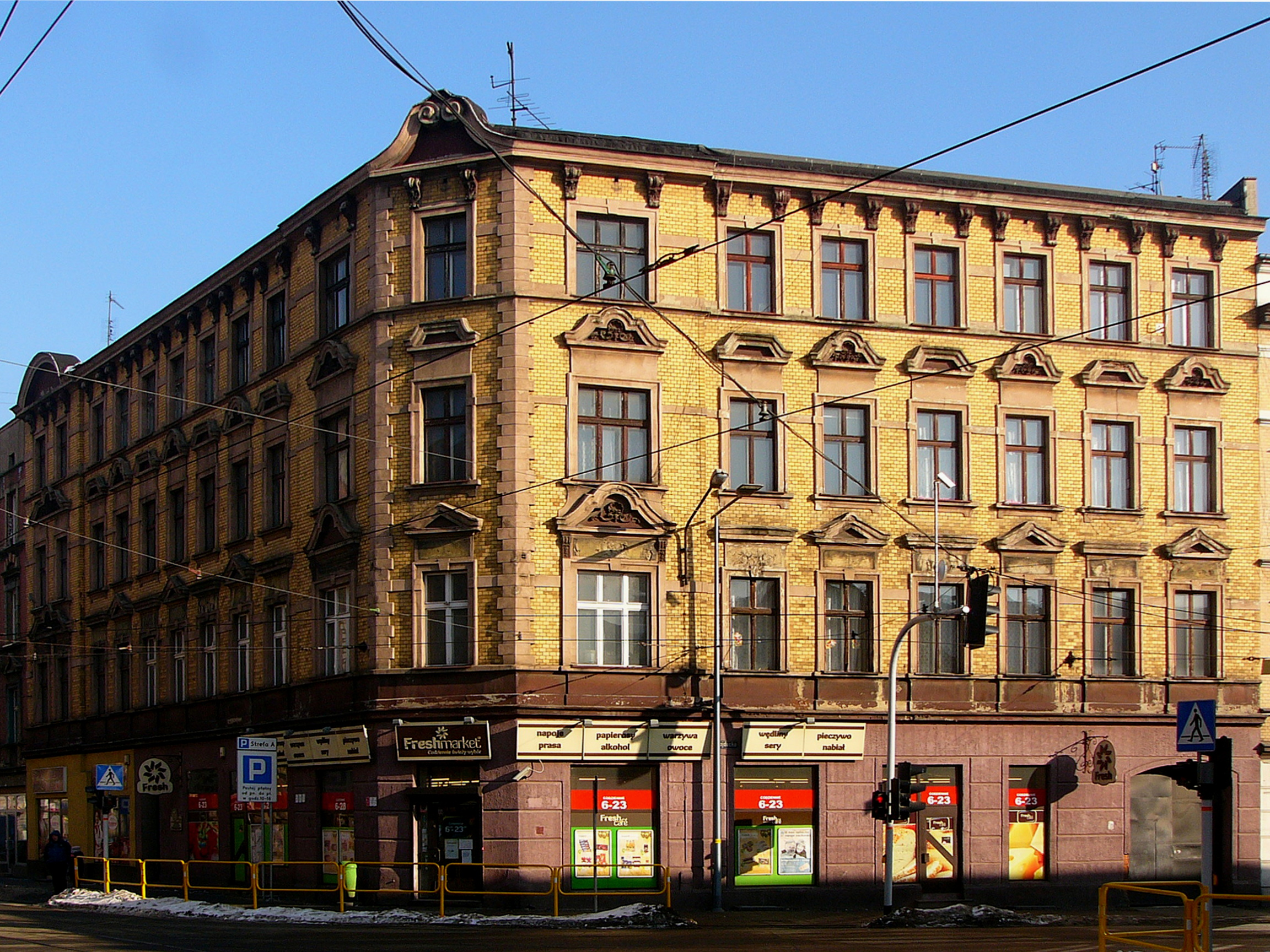 Geburtshaus von Kurt Alder in der Kaiserstr. / Adolf-Hitler-Str. / ul. Wolności 59 Ecke Grenzstr. / ul. Strzelców Bytomskich in Königshütte / Królewska Huta / Chorzów in Oberschlesien